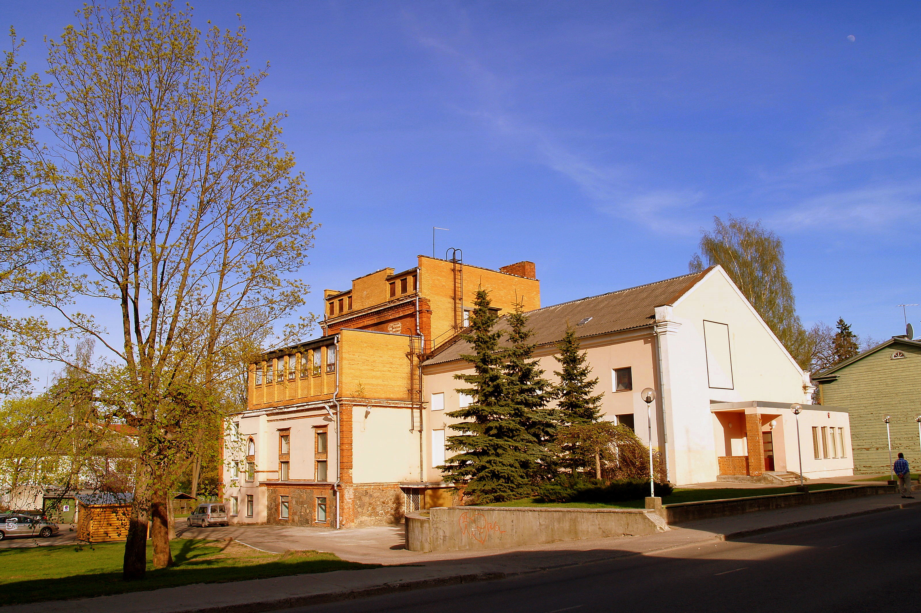 Sõbra maja Tartus Kalevi tänaval.